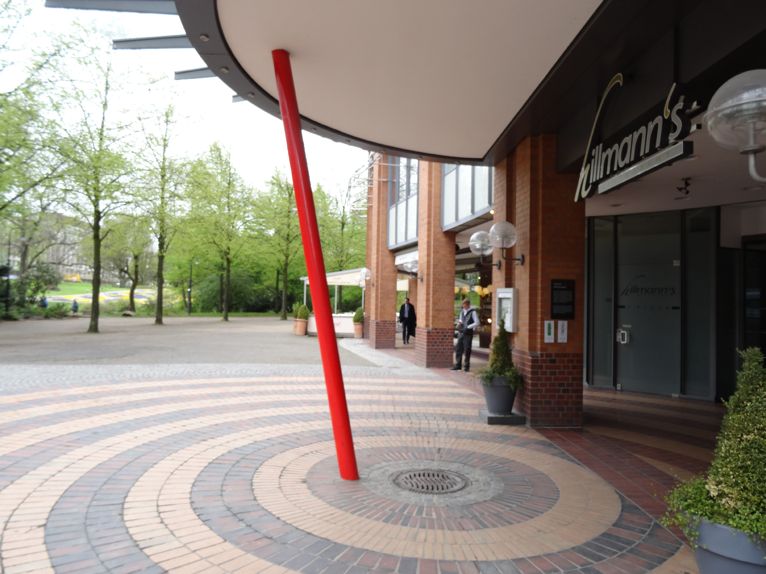 Infotafel: Hotel am Hillmannplatz, Hillmannplatz 20